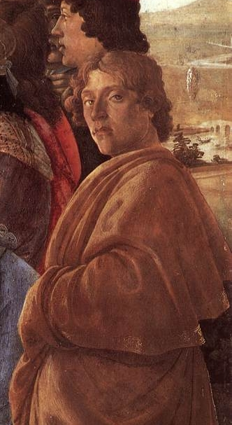 detail